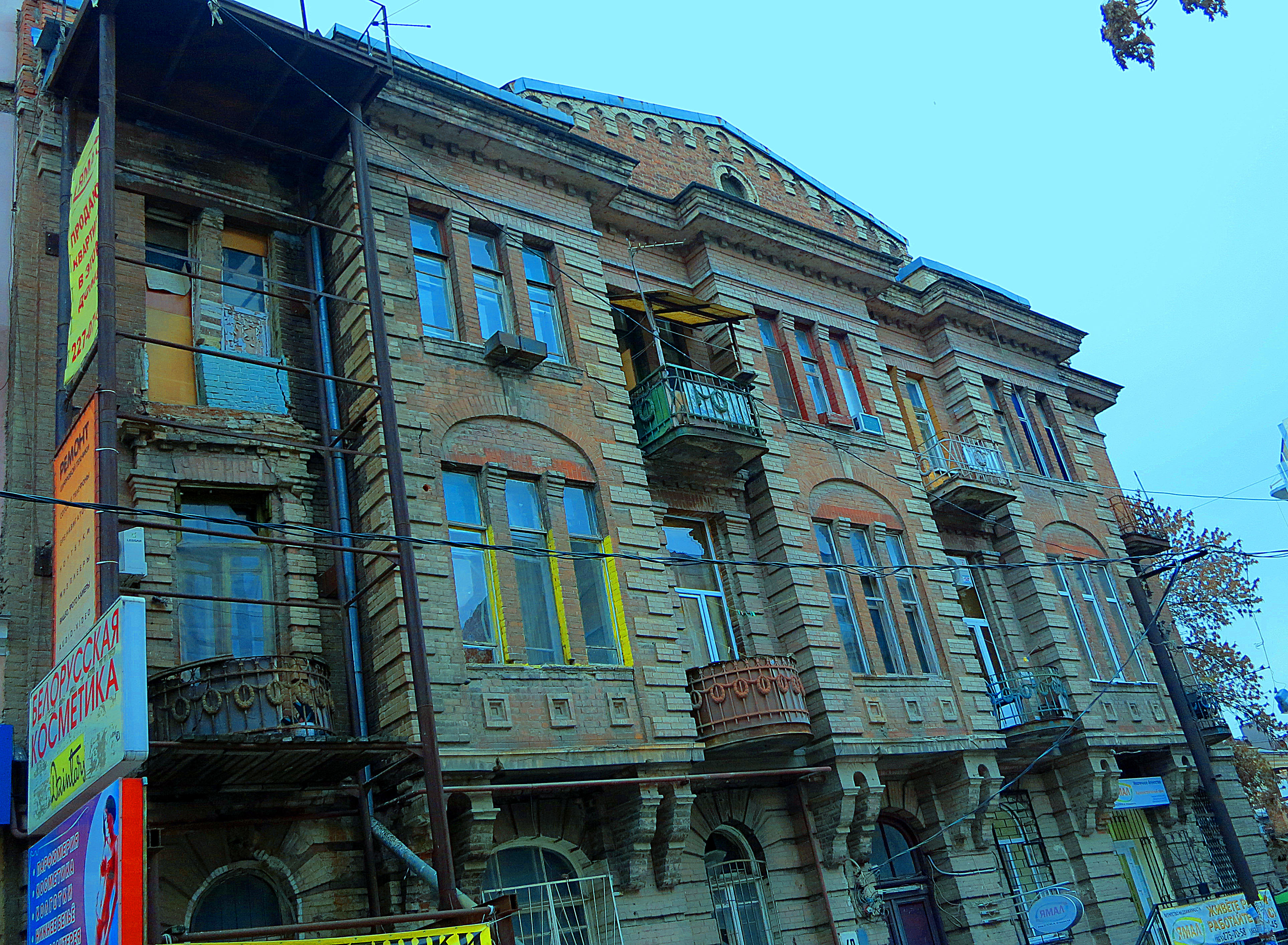 Доходный дом М.Ф. Кофус: улица Шаумяна, 48, литер А, Ростов-на-Дону, Ростовская область